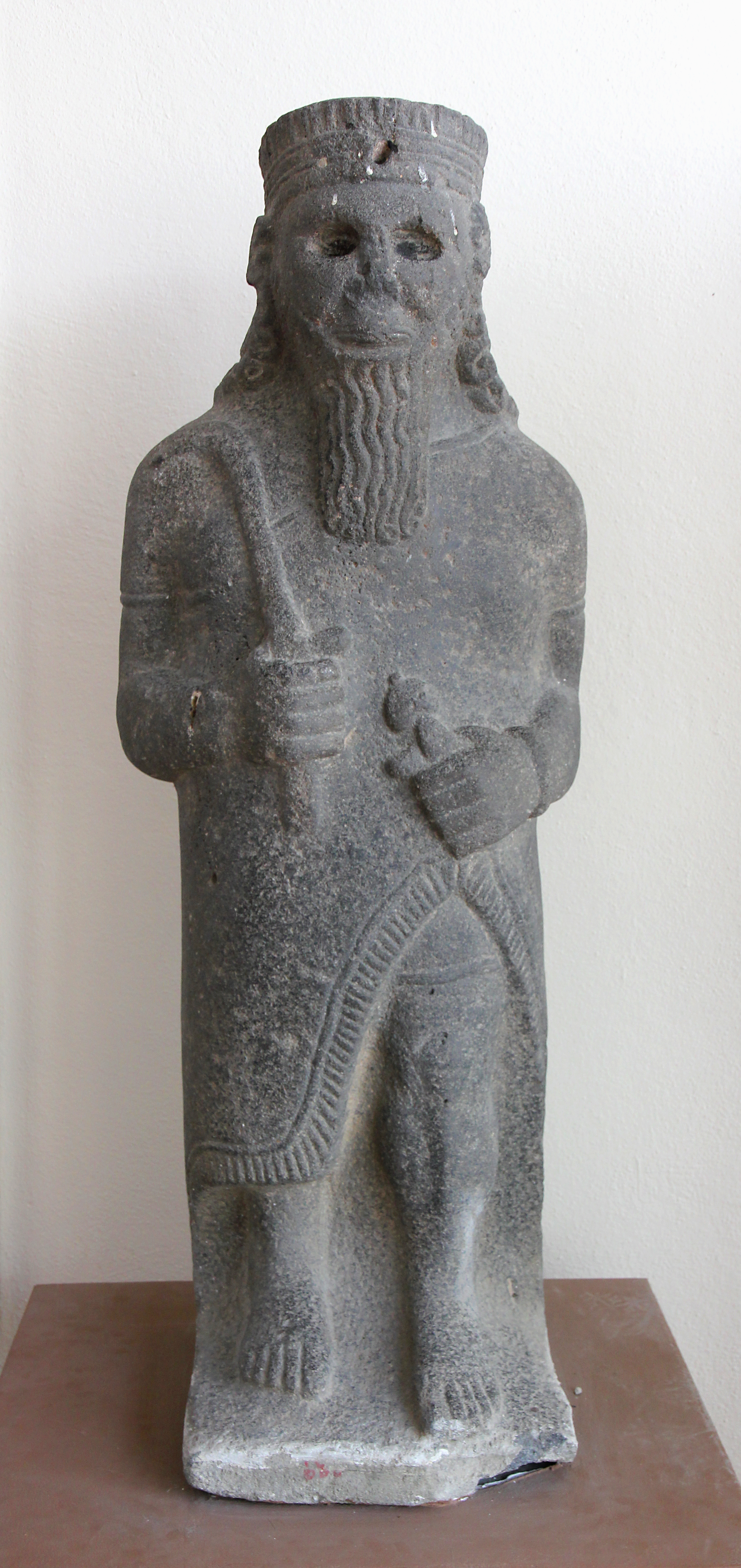 Late Hittite period